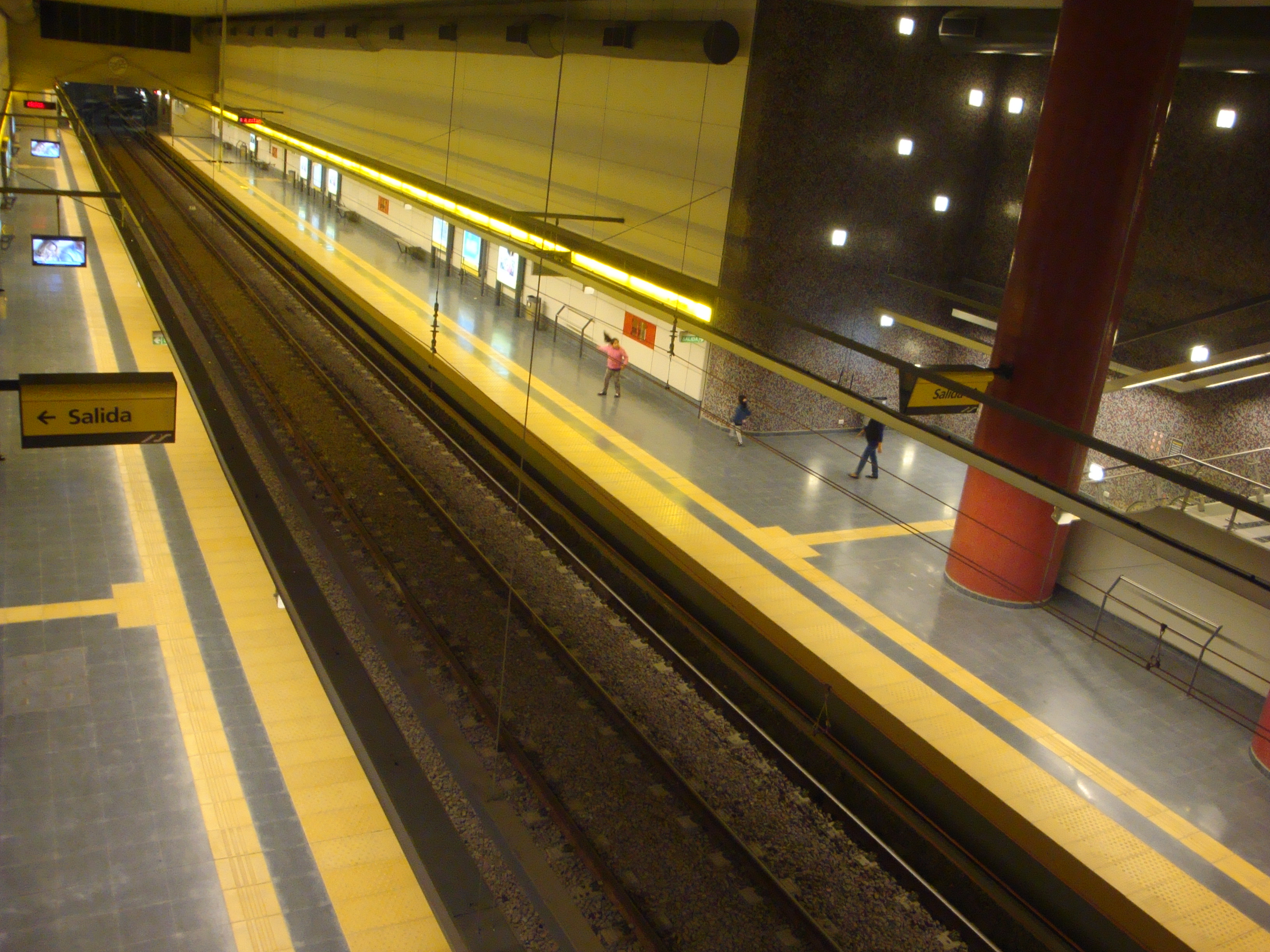 Vista lateral de la estación Parque Patricios de la línea H del Subte de Buenos Aires.